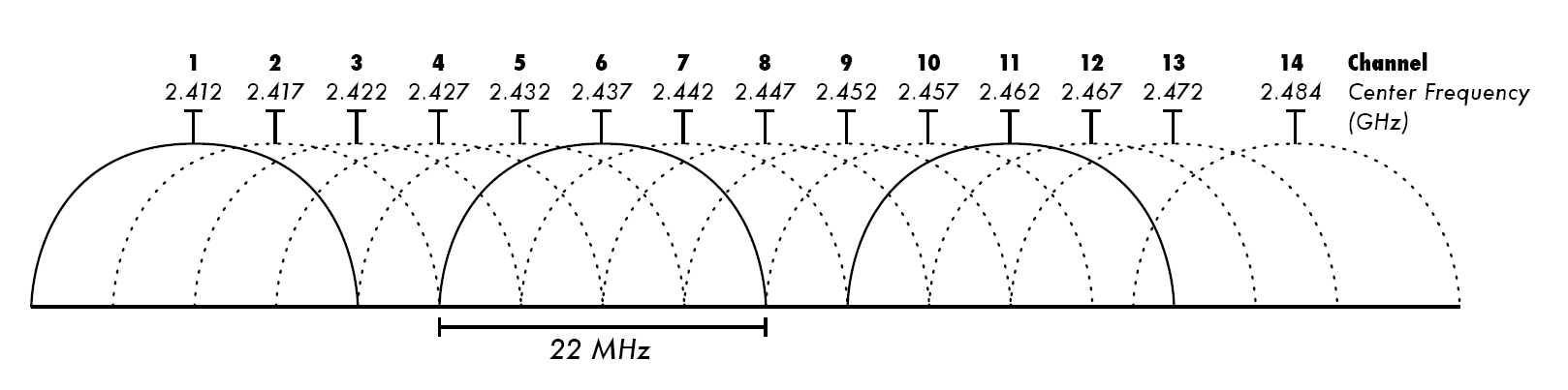 2.4 GHz Wi-Fi channels (802.11b,g WLAN)